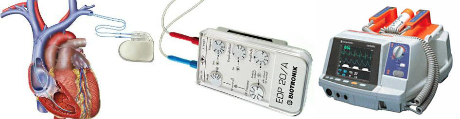 Elektrokardiostimulyatorlar (daxilə və xaricə implantasiya üçün), Defibrilyator